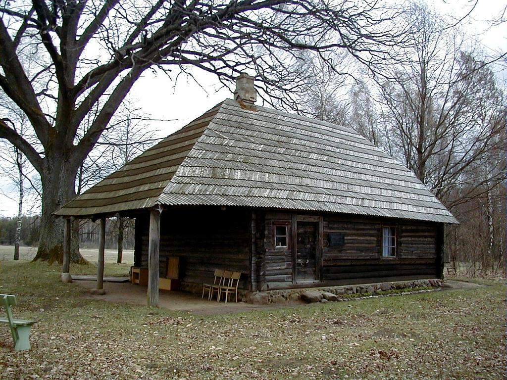 Lauči - L. Paegles muzejs Vidrižu pagastā. 2003-05-01